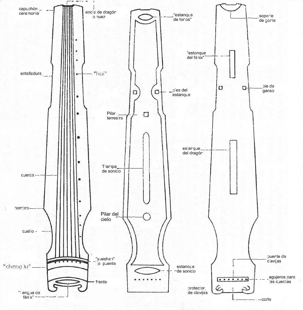 diagrama de guqin